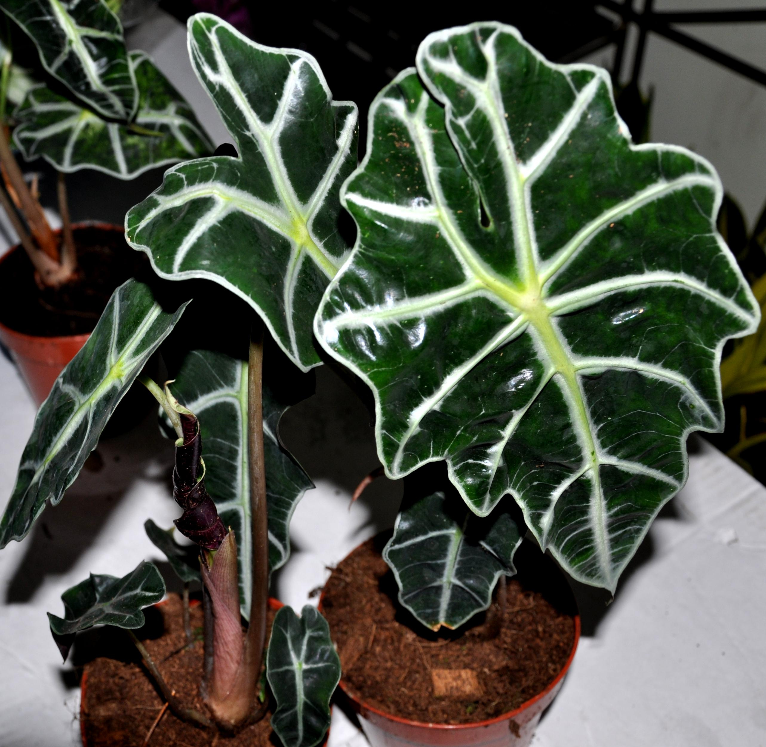 გადაღებულია თბილისში Taken in Tbilisi